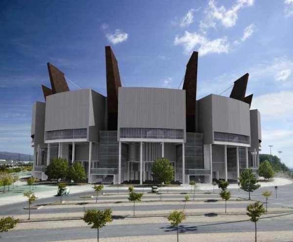 Vista del pabellón Fernando Buesa Arena tras la ampliación realizada durante 2011Euskara: Fernando Buesa Arenako ikuspegia 2011.urtean egindako handitzearen ondoren